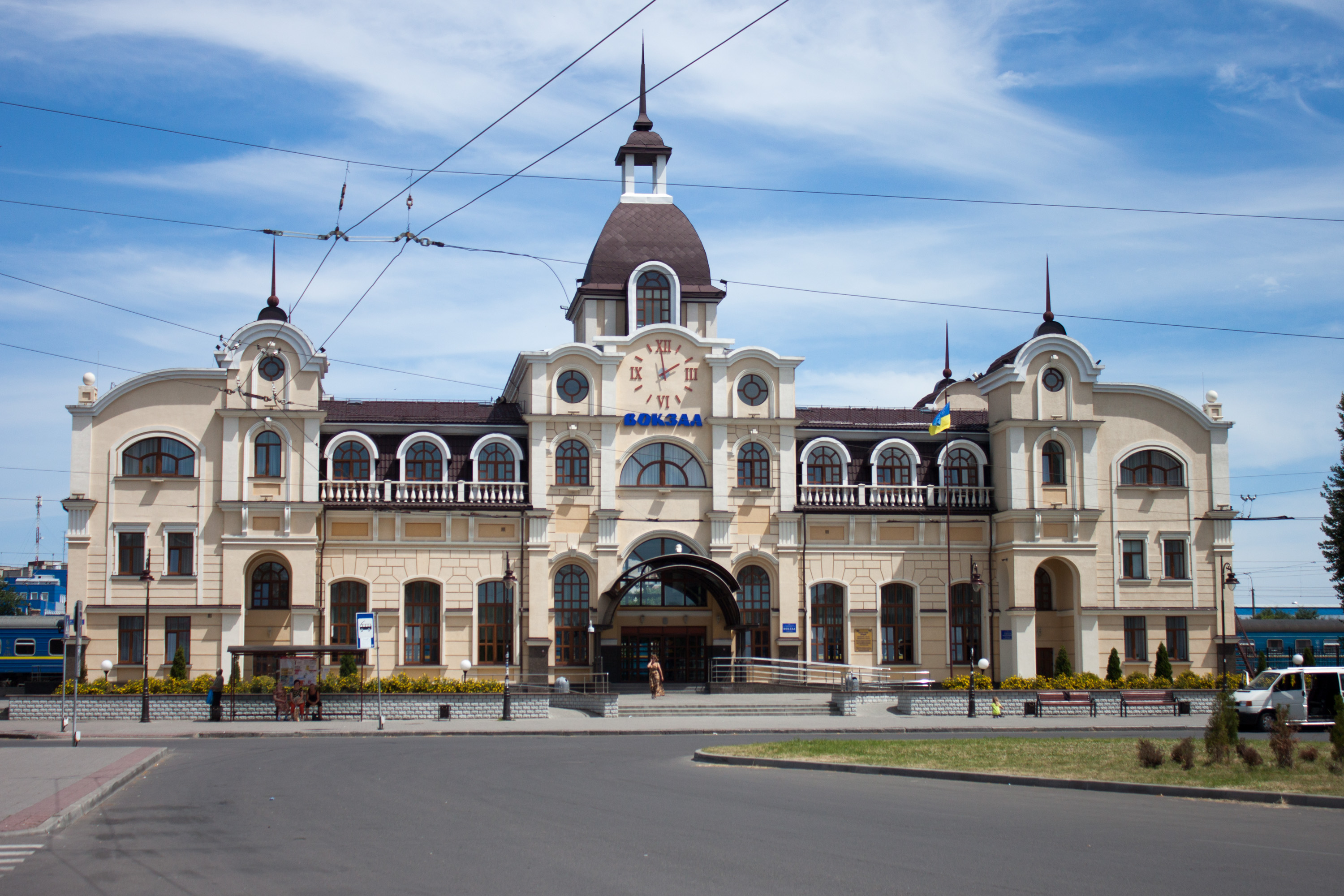 Center, Lutsk, Volyns'ka oblast, Ukraine